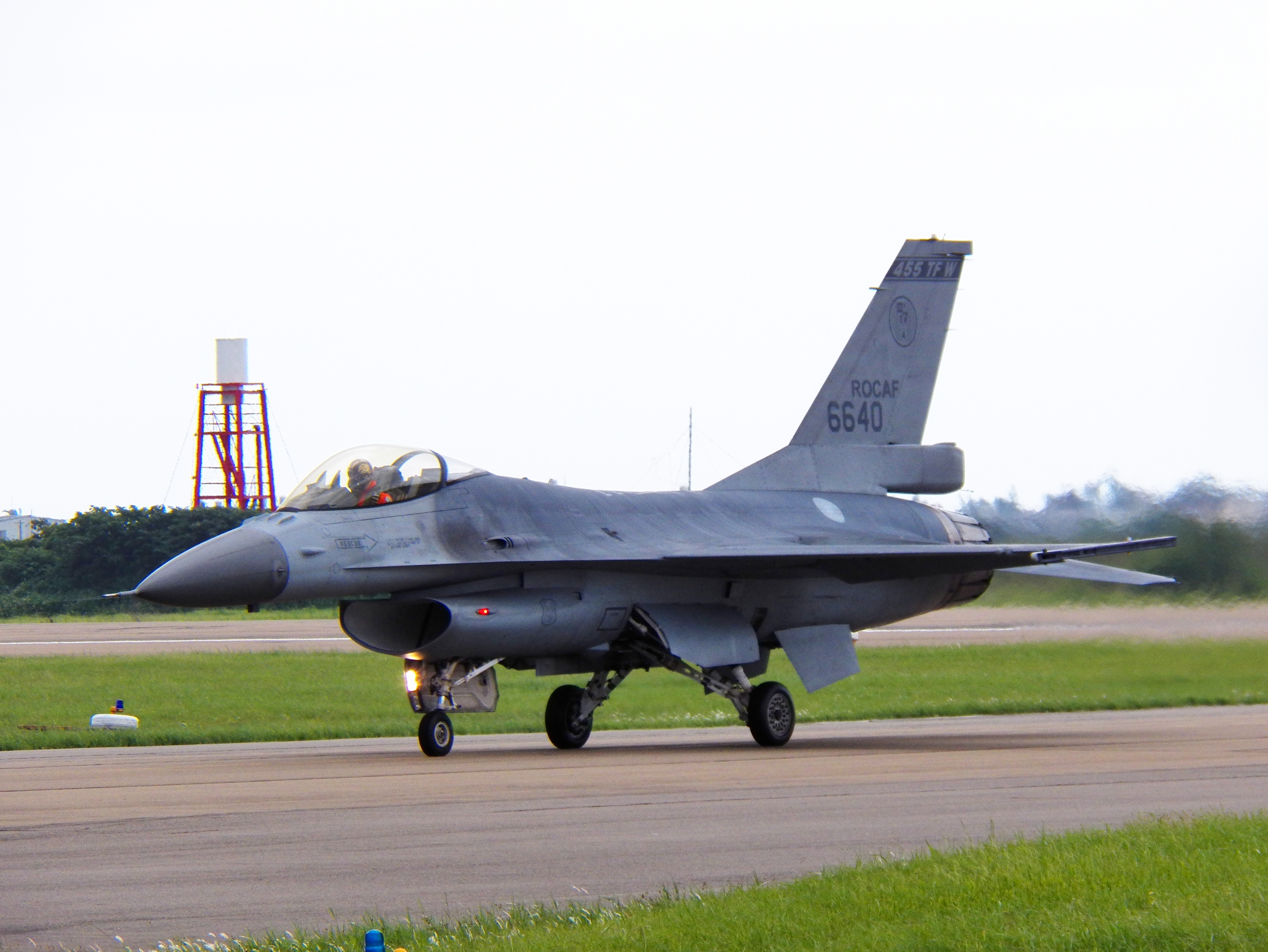 中華民國空軍455聯隊F-16A 6640降落空軍新竹基地跑道後，滑走進入停機坪。